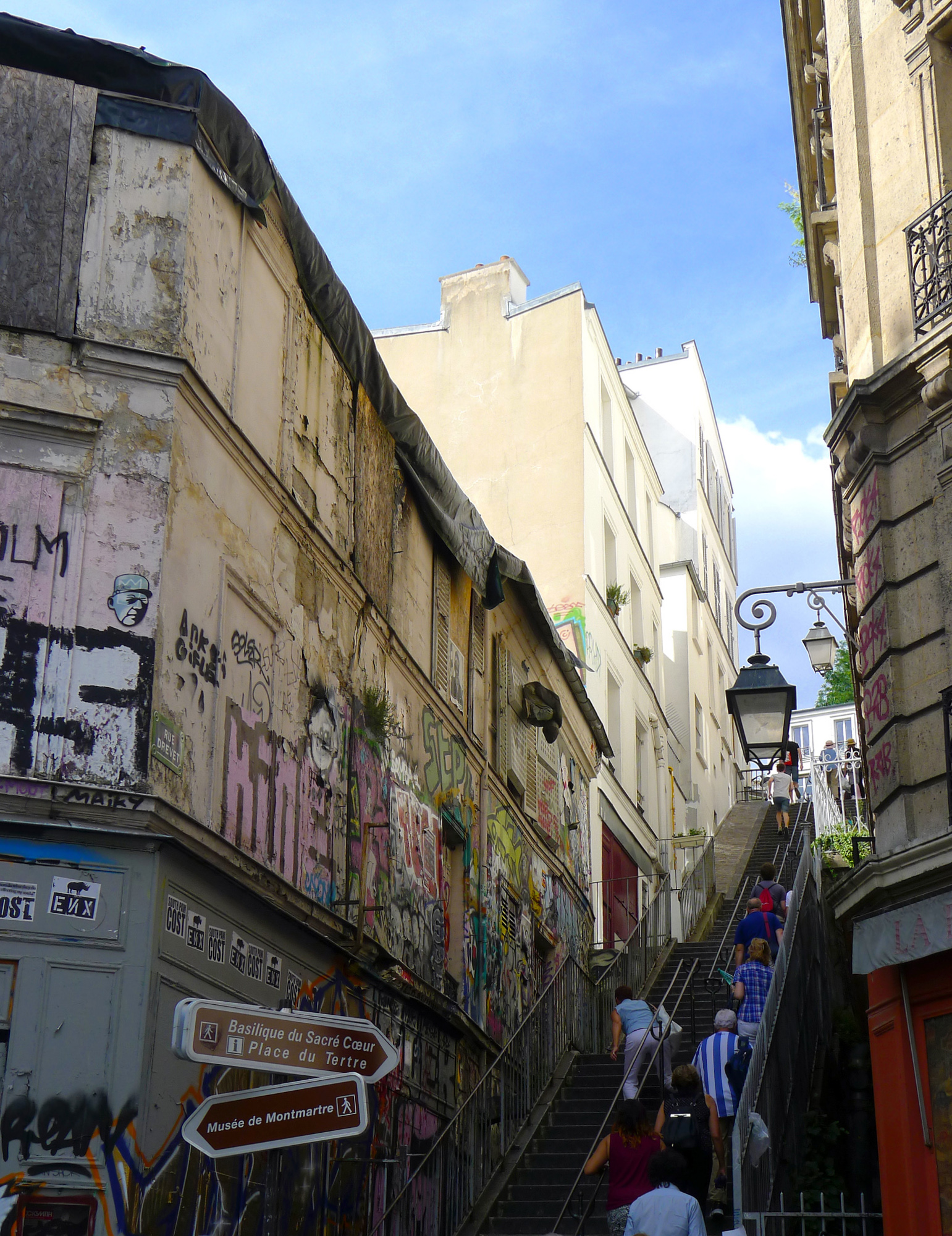 Rue Drevet - Paris XVIII